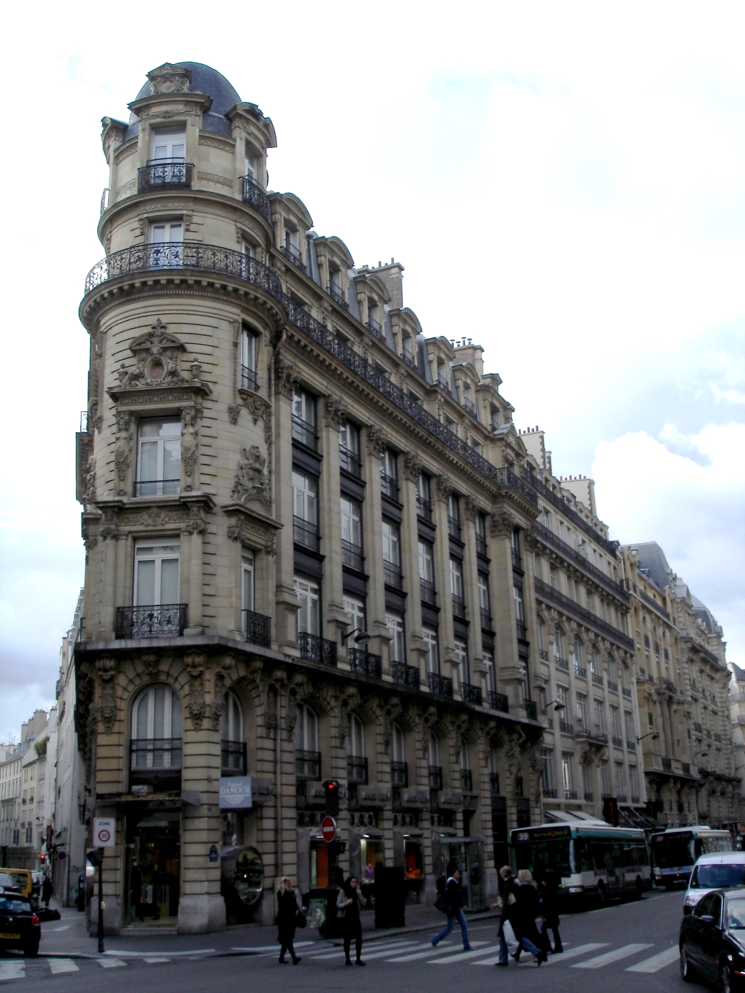 101 rue Réaumur (Paris) Apartment block